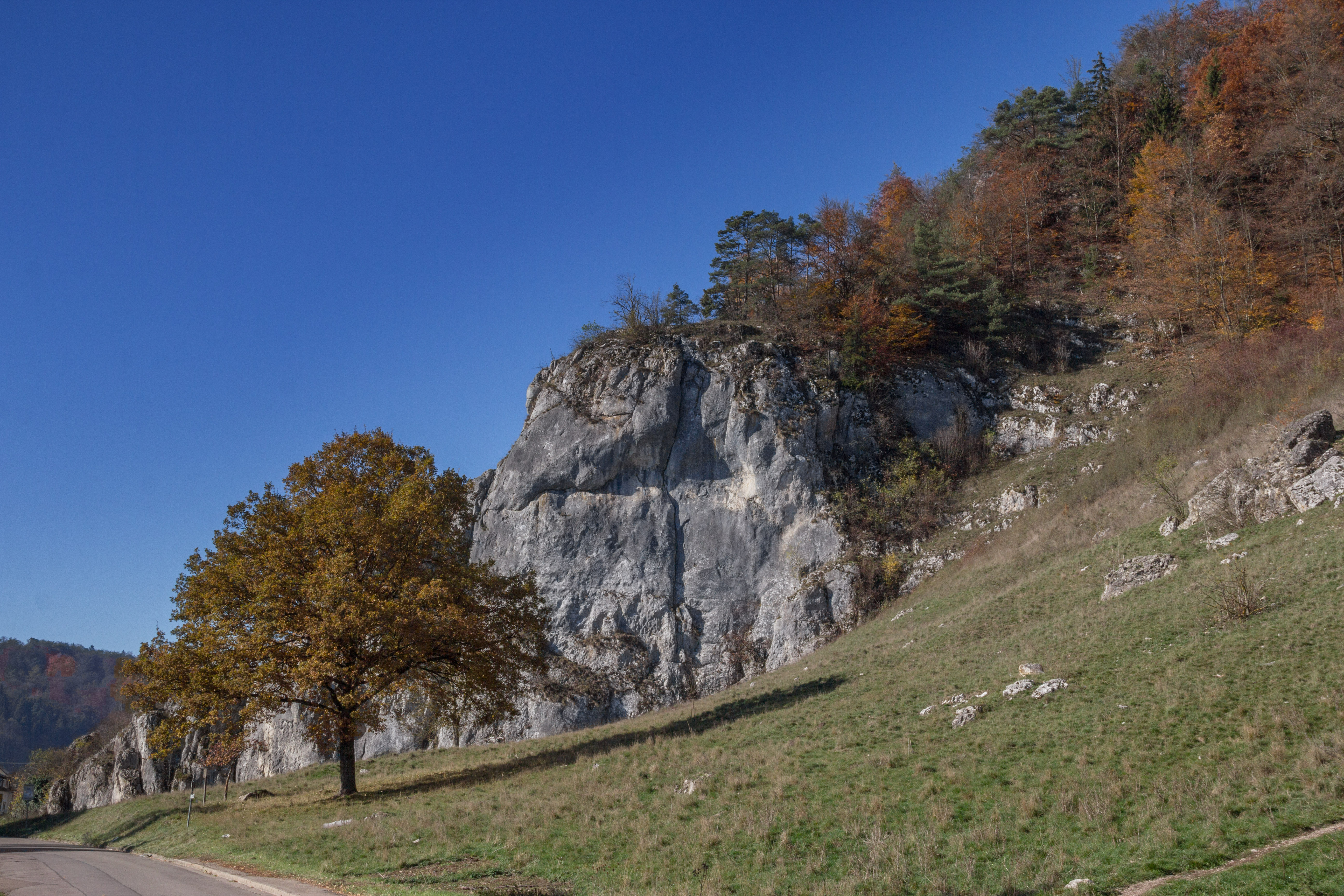 Dohlenfelsen, Geotop, Naturpark und LSG Altmühtal